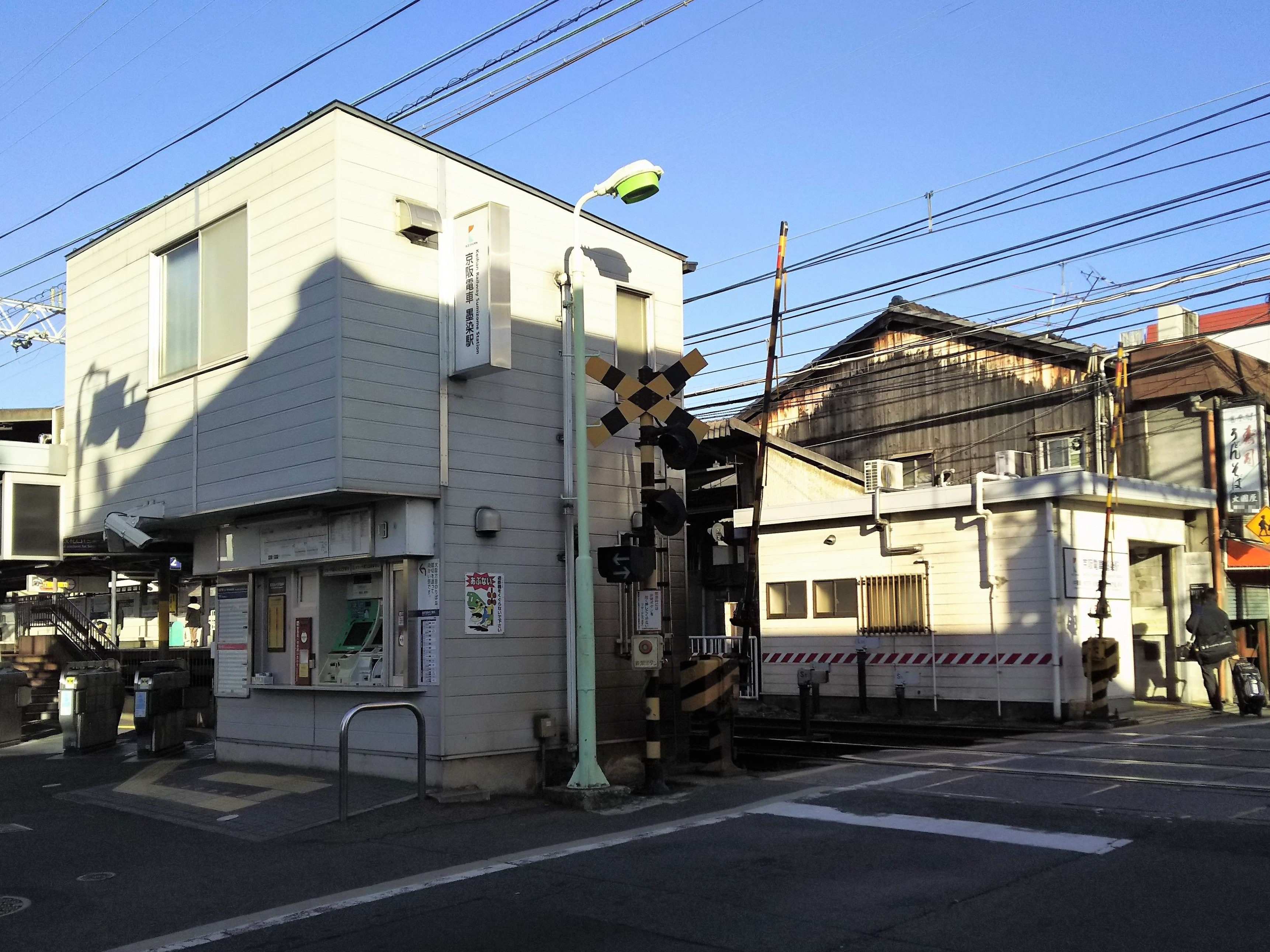 京阪本線墨染駅駅舎（京都市伏見区）